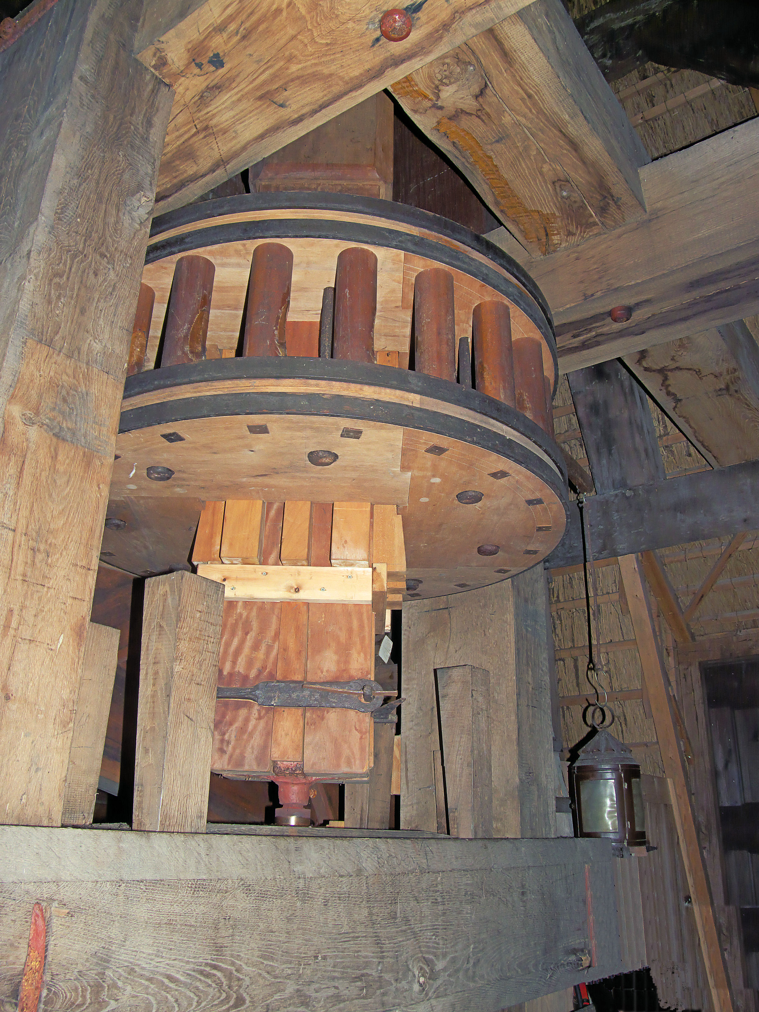 Noordeveldse molen, Dussen, Netherlands, onderschijfloop met schaargebint)